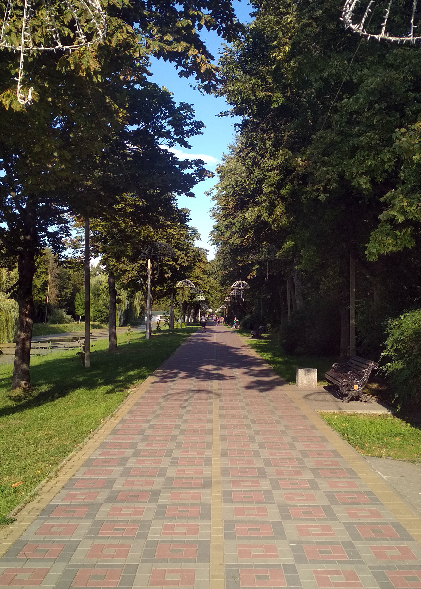 "Алея ліхтарів" у Парку імені Лесі Українки, Луцьк